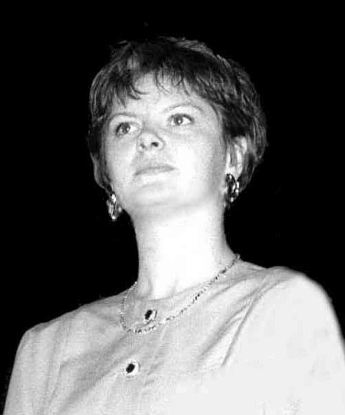 Reka Zsofia Lazăr-Szabo in Bucharest